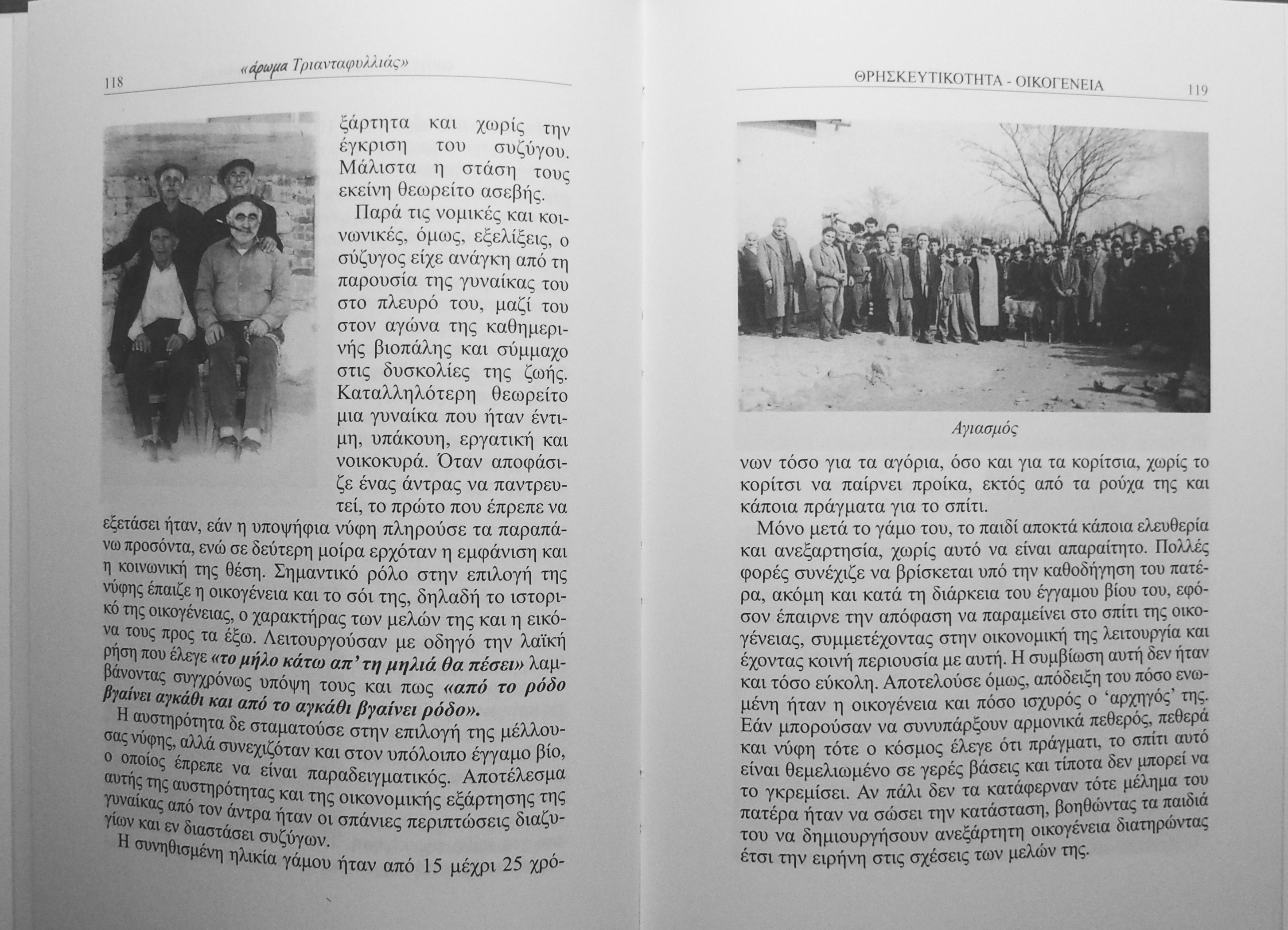 Άρωμα Τριανταφυλλιάς, σελίδα 100